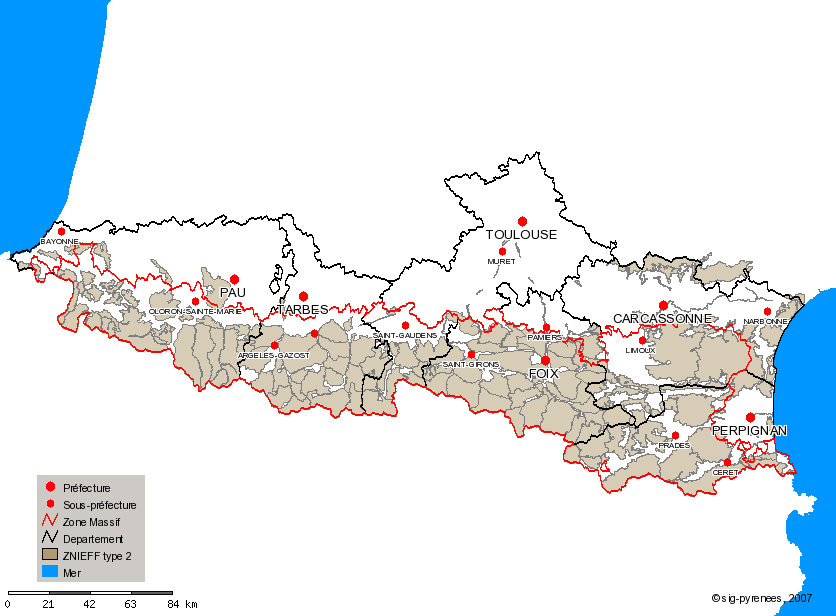 Carte de localisation des ZNIEFF de type 2 dans les Pyrénées